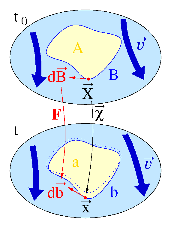 Strömung (dunkel blau) mit materieller Kurve (blau), die eine Fläche (gelb) berandet